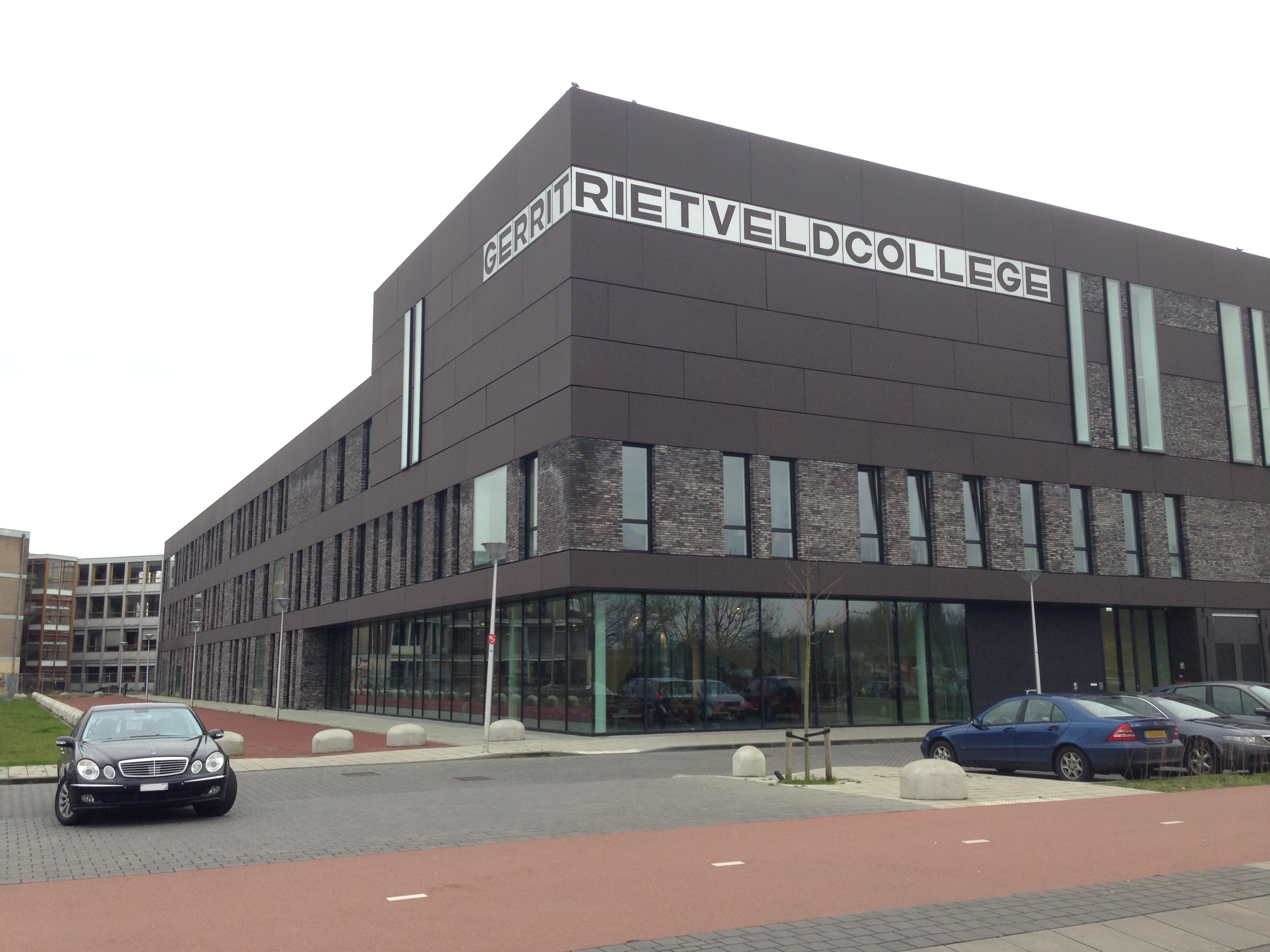 Gerrit Rietveld College - Utrecht